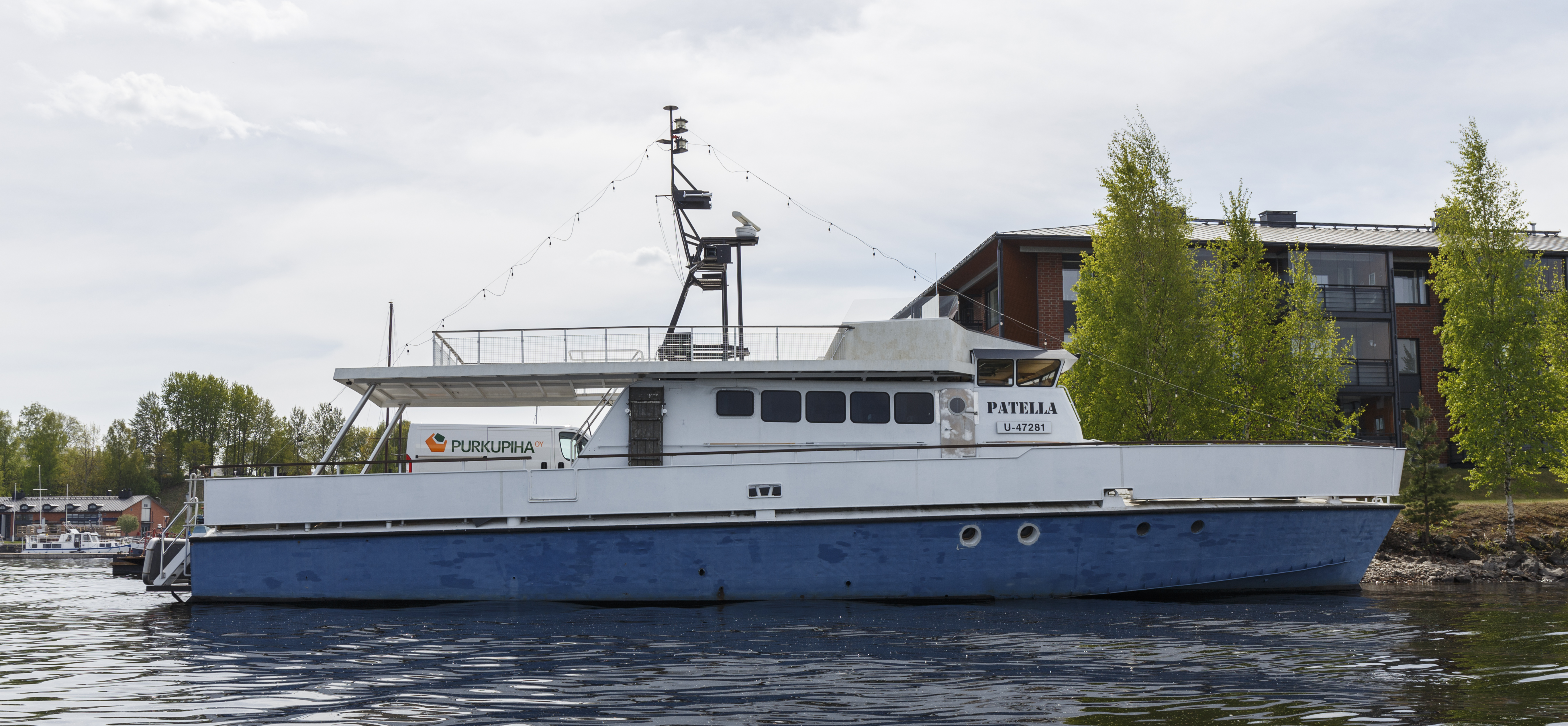 Lysekil i privat ågo 2019